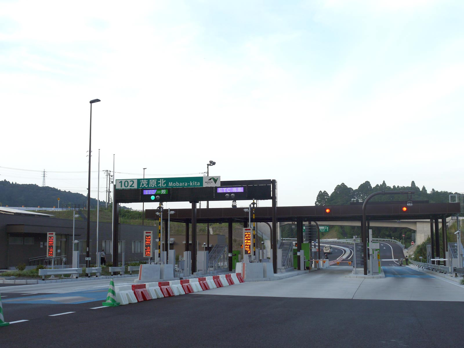 茂原北IC